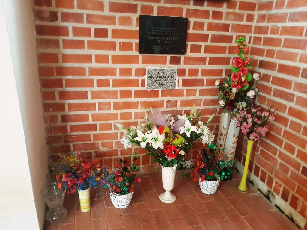 Kościół Pierzchały Gerhard Steffen